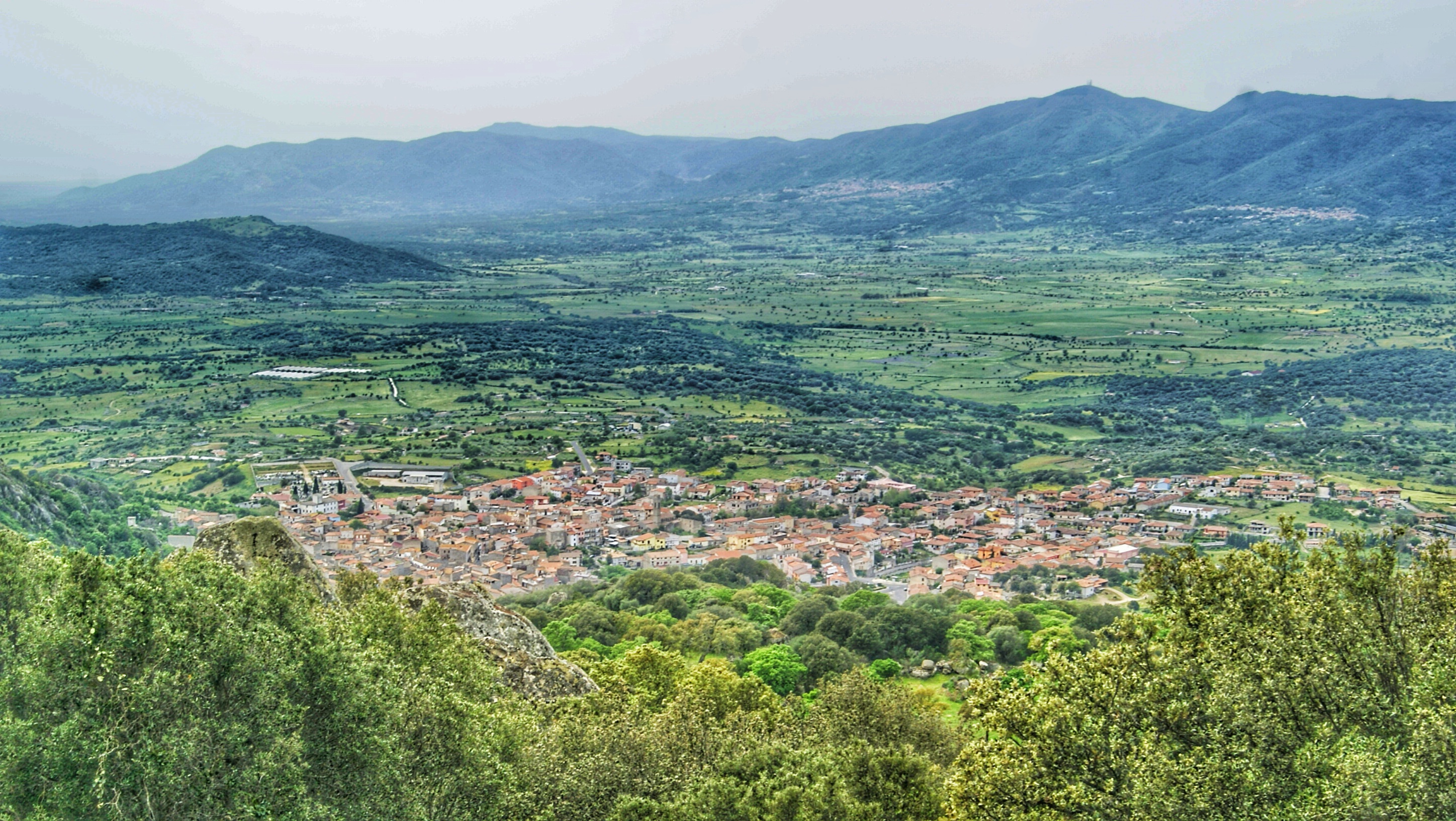 Vista di Benetutti e del Goceano (Nule)